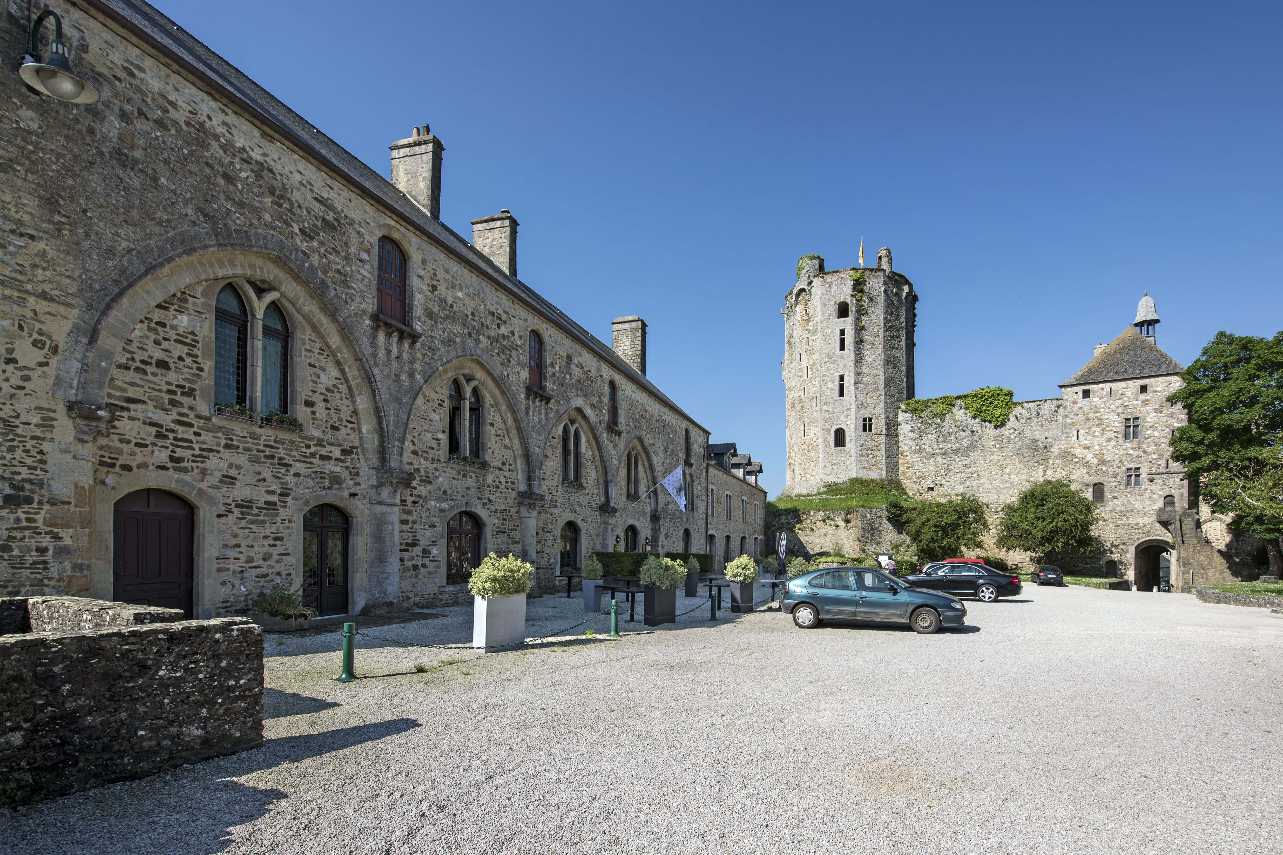 Château de Bricquebec, Manche, 2017.